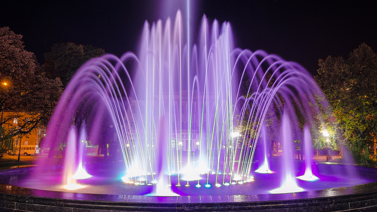 Музыкальный фонтан. Чернигов